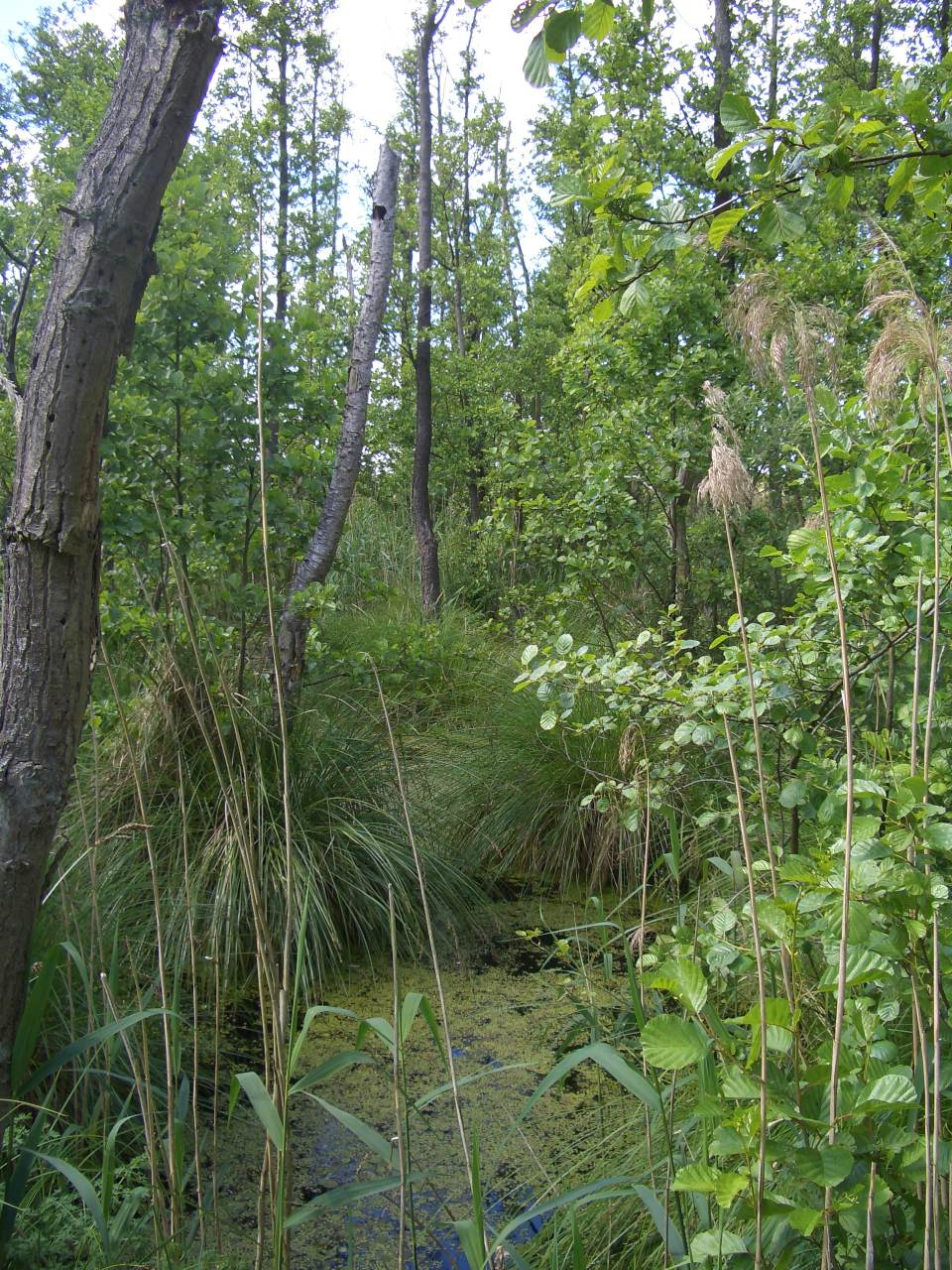 Erlenbruchwald im Randbereich des Naturschutzgebietes Kieshofer Moor.